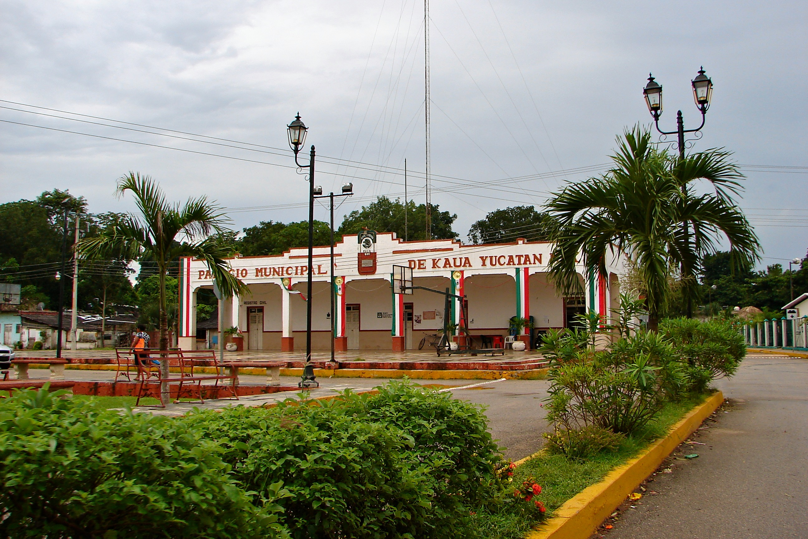 Kaua Municipality, Yucatán, Mexico